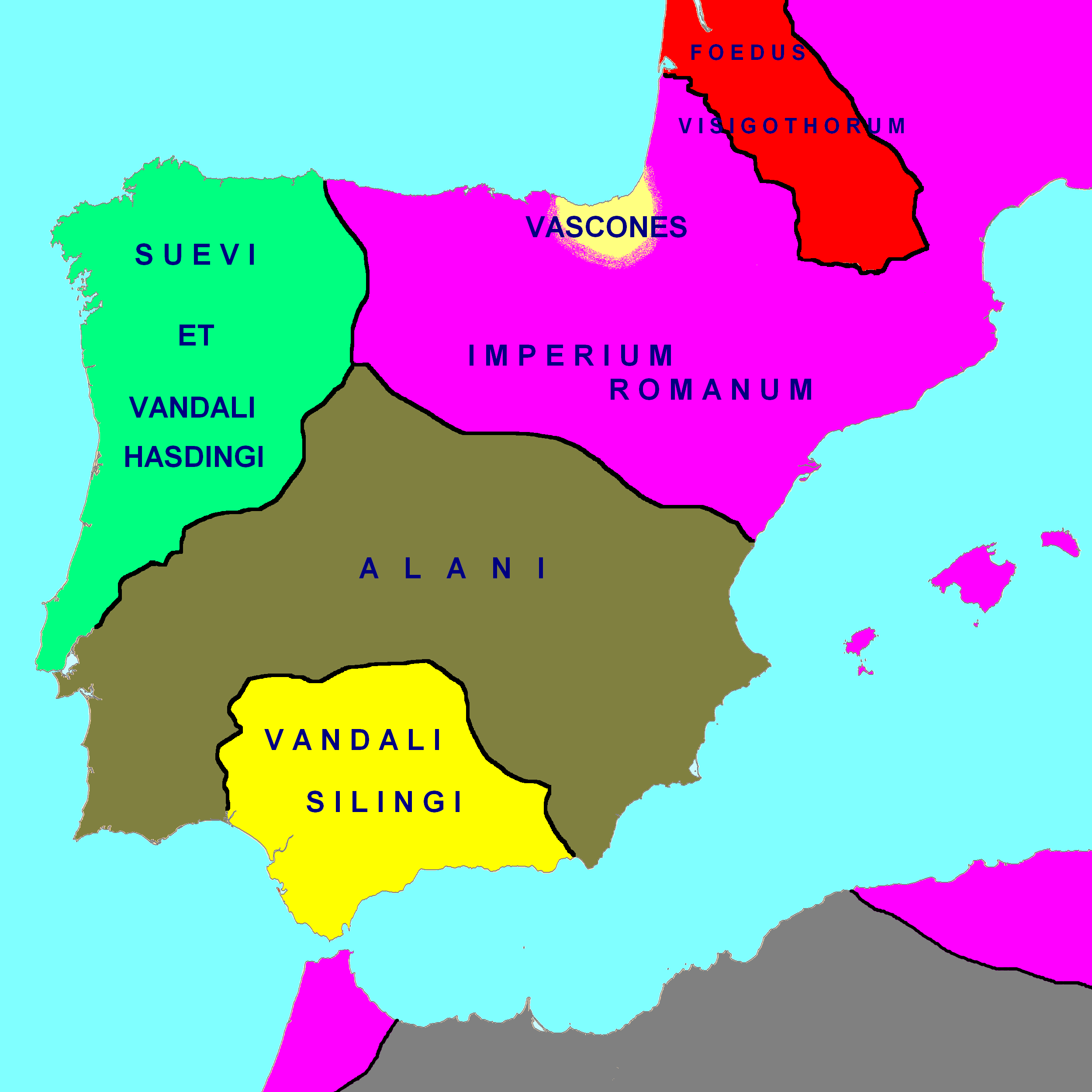 Península ibérica en el año 418, tras el reparto de Hispania por los invasores renanos (411) y el asentamiento visigodo en Aquitania II. Iberian peninsula in year 418, after the Rhine invaders had divided Hispania (411) and the settlement of the Visigoths in Aquitania II.